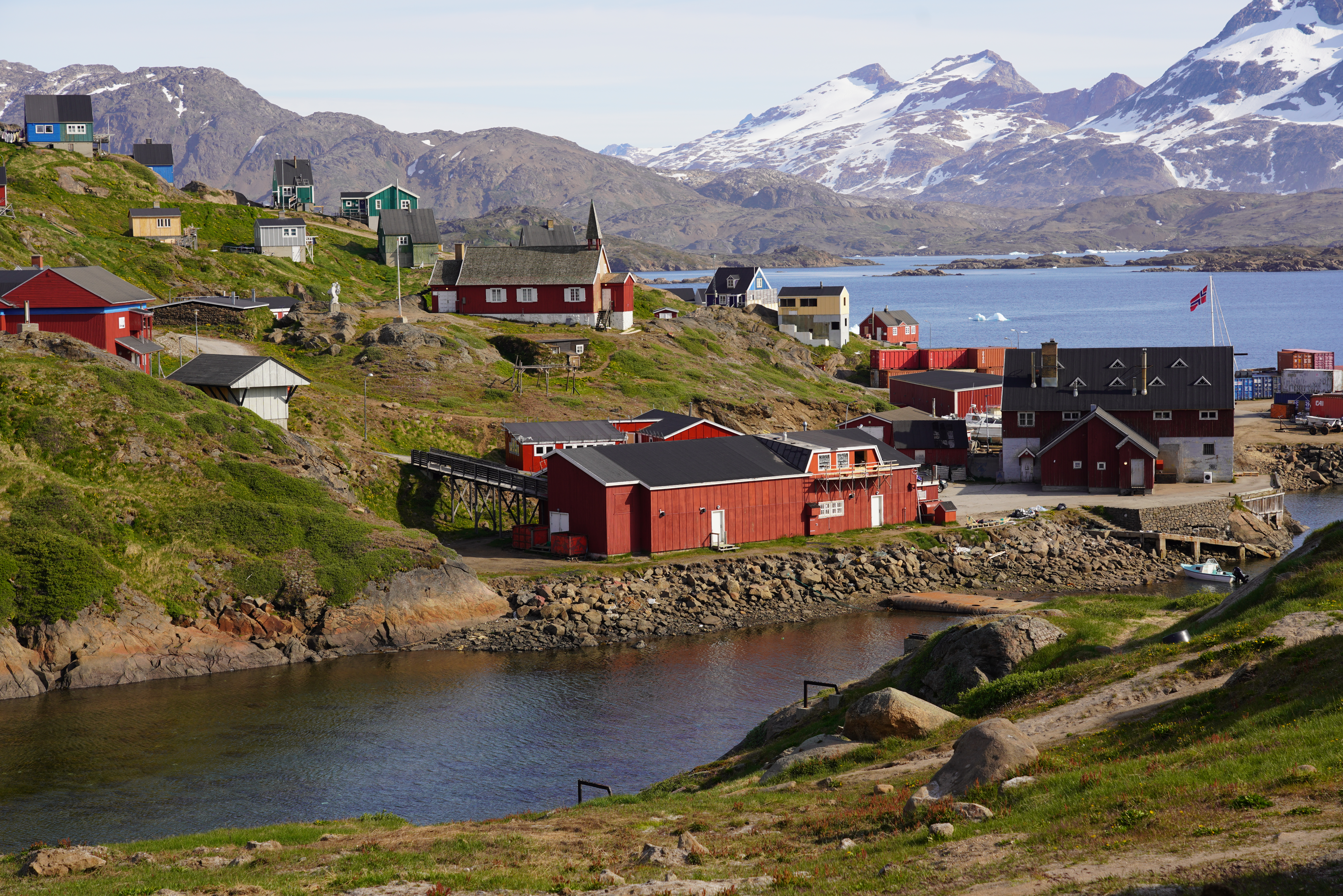 20190626_Harbor_0308